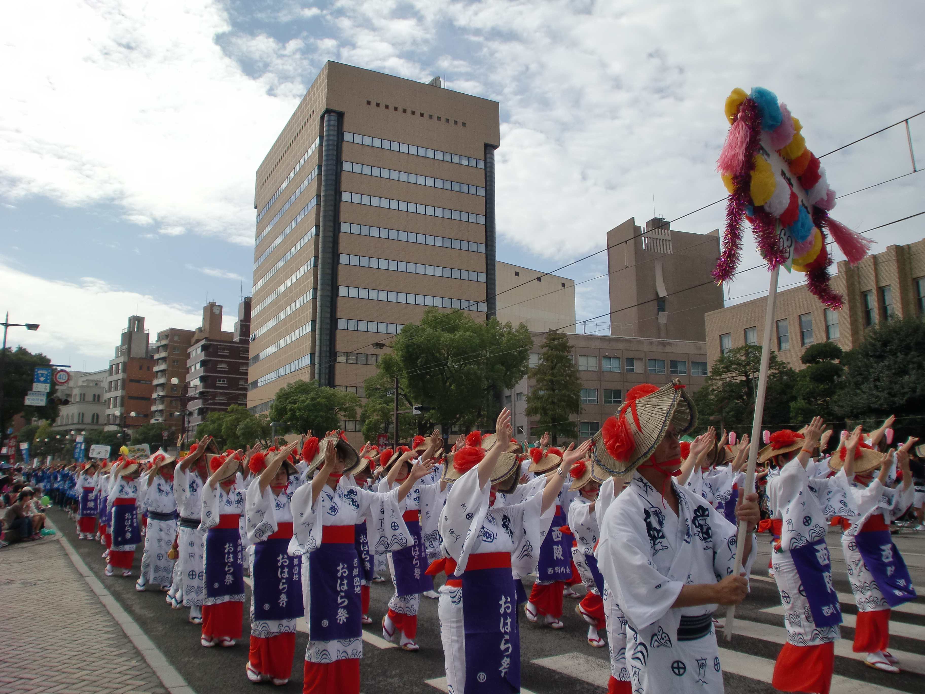 おはら祭の様子。総踊りの鹿児島おはら節を踊っている。